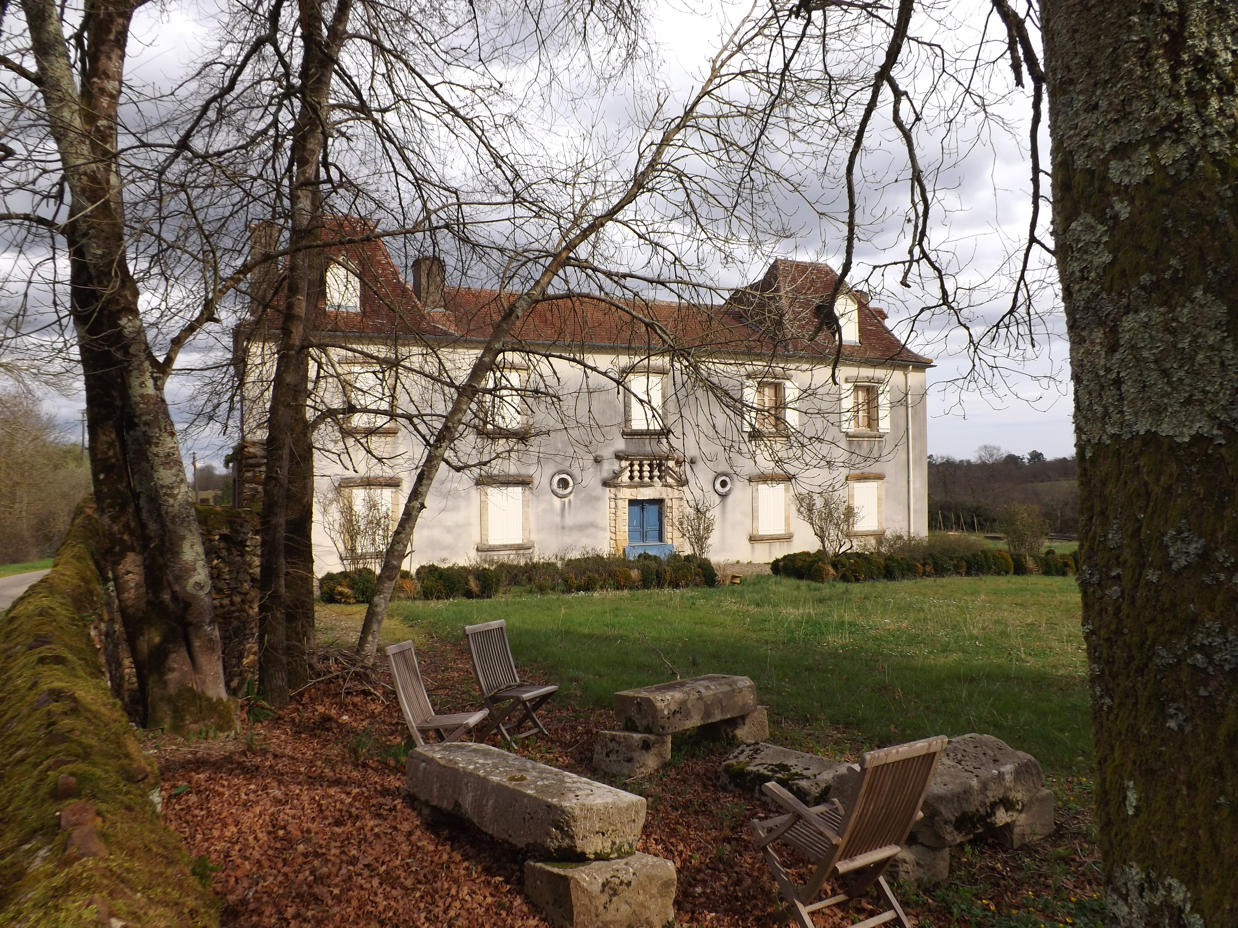 Castèth de Beirias; Beirias, Gasconha, Occitania